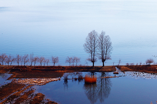 Lugu lake marshy land